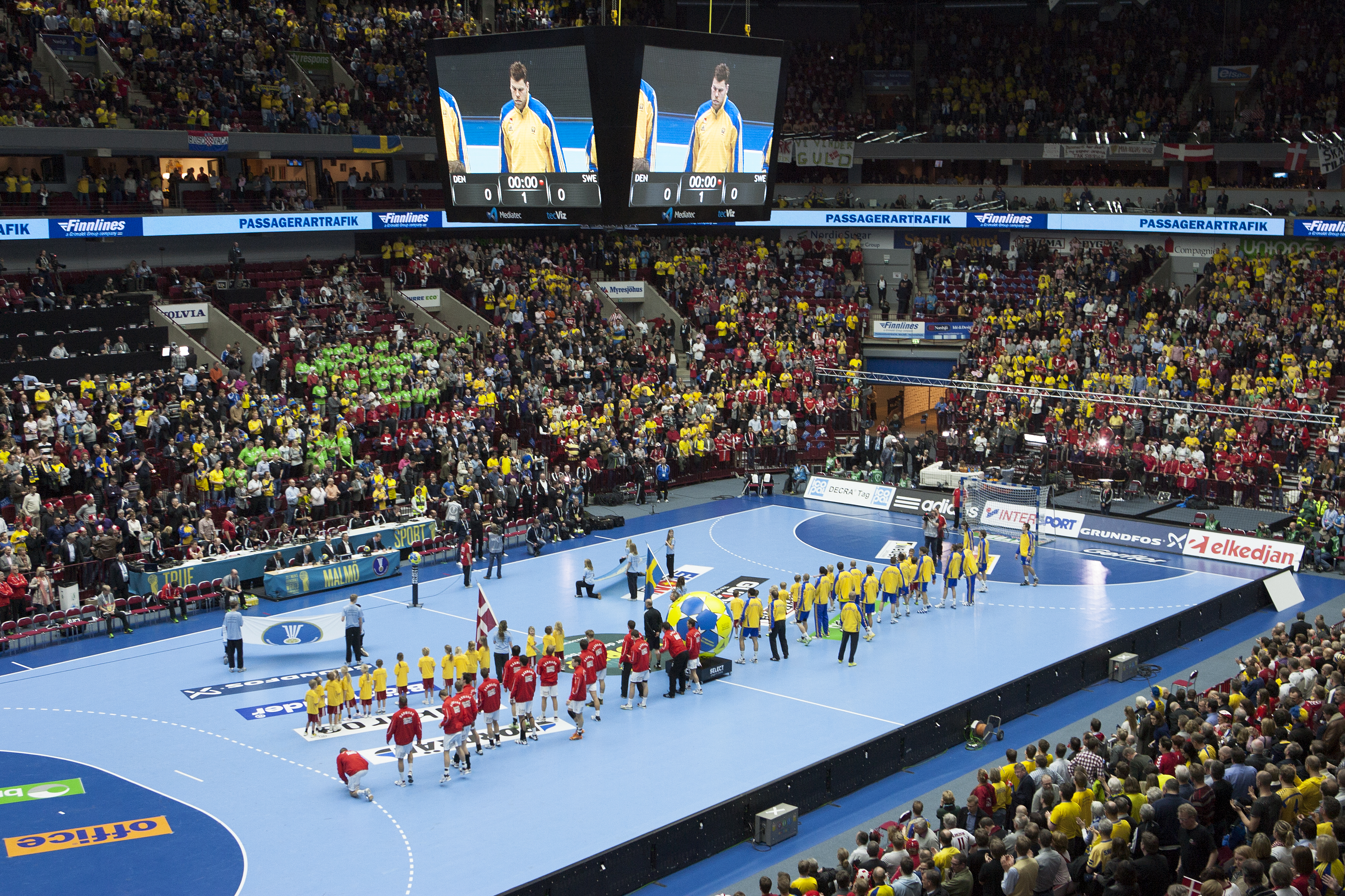 Handbolls VM den 25 januari 2011, match mellan Sverige och Danmark i Malmö Arena.